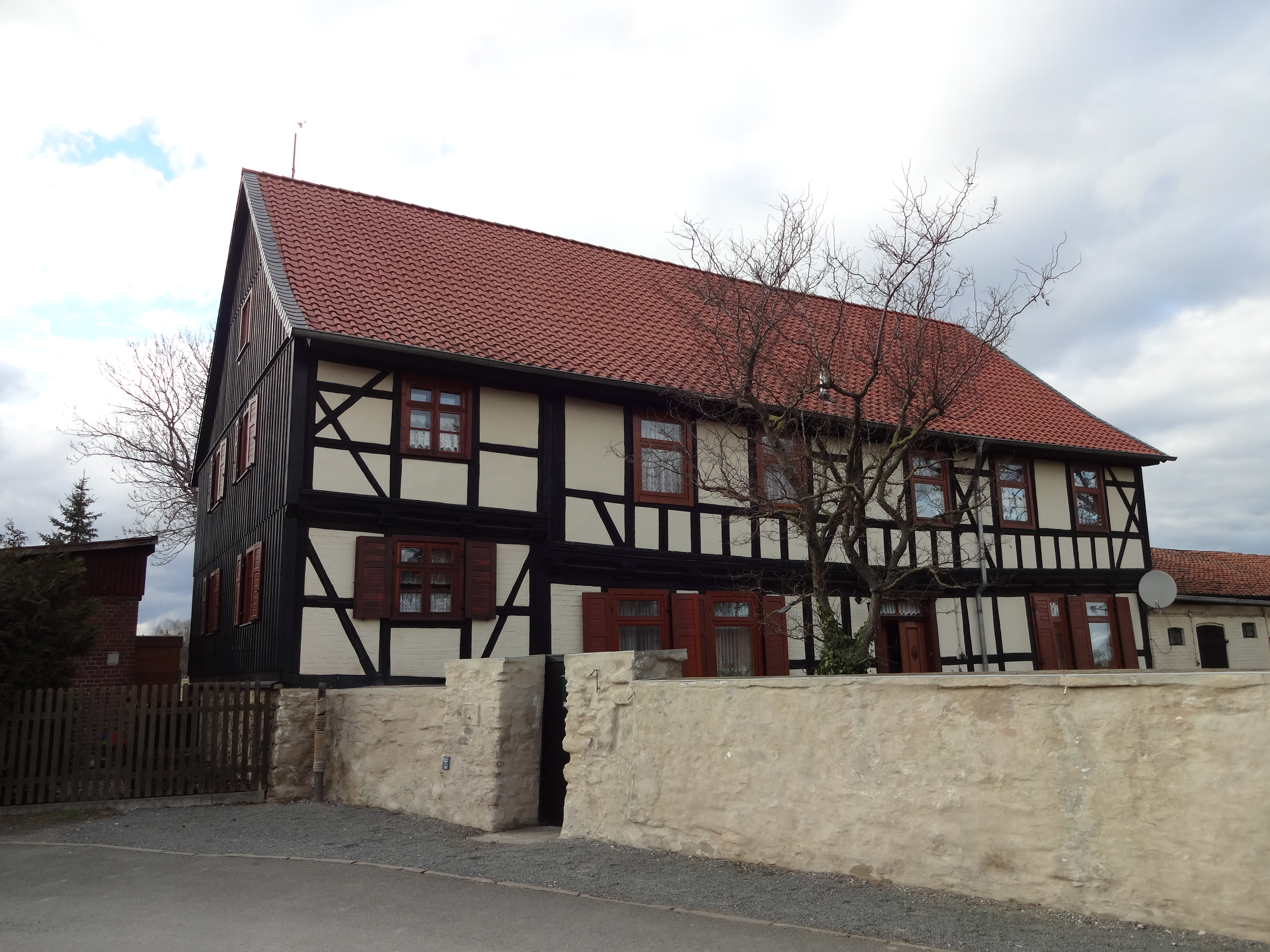 denkmalgeschützter Bauernhof in der Straße Pfingstgras 1 in Silstedt, Ortsteil von Wernigerode